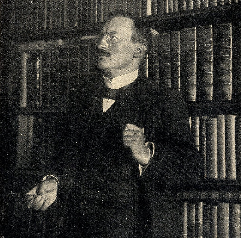 Dr. Sven Hedin zu Hause, 1902